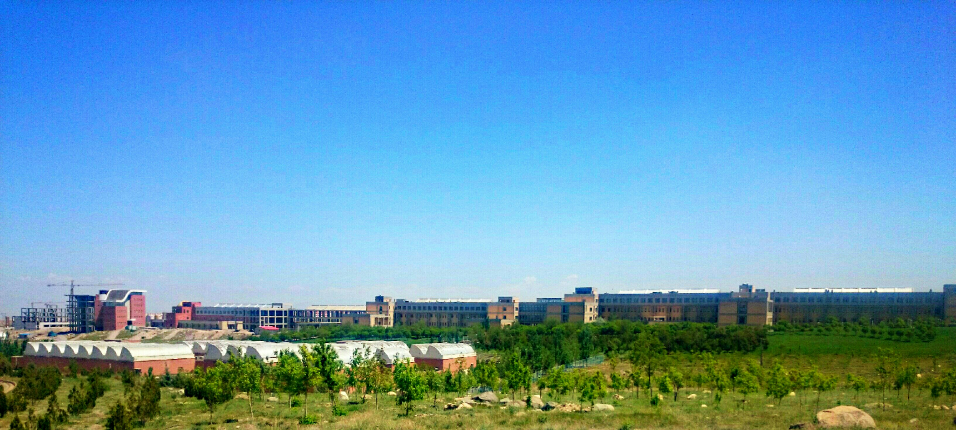 نمای کلی دانشگاه صنعتی سهند